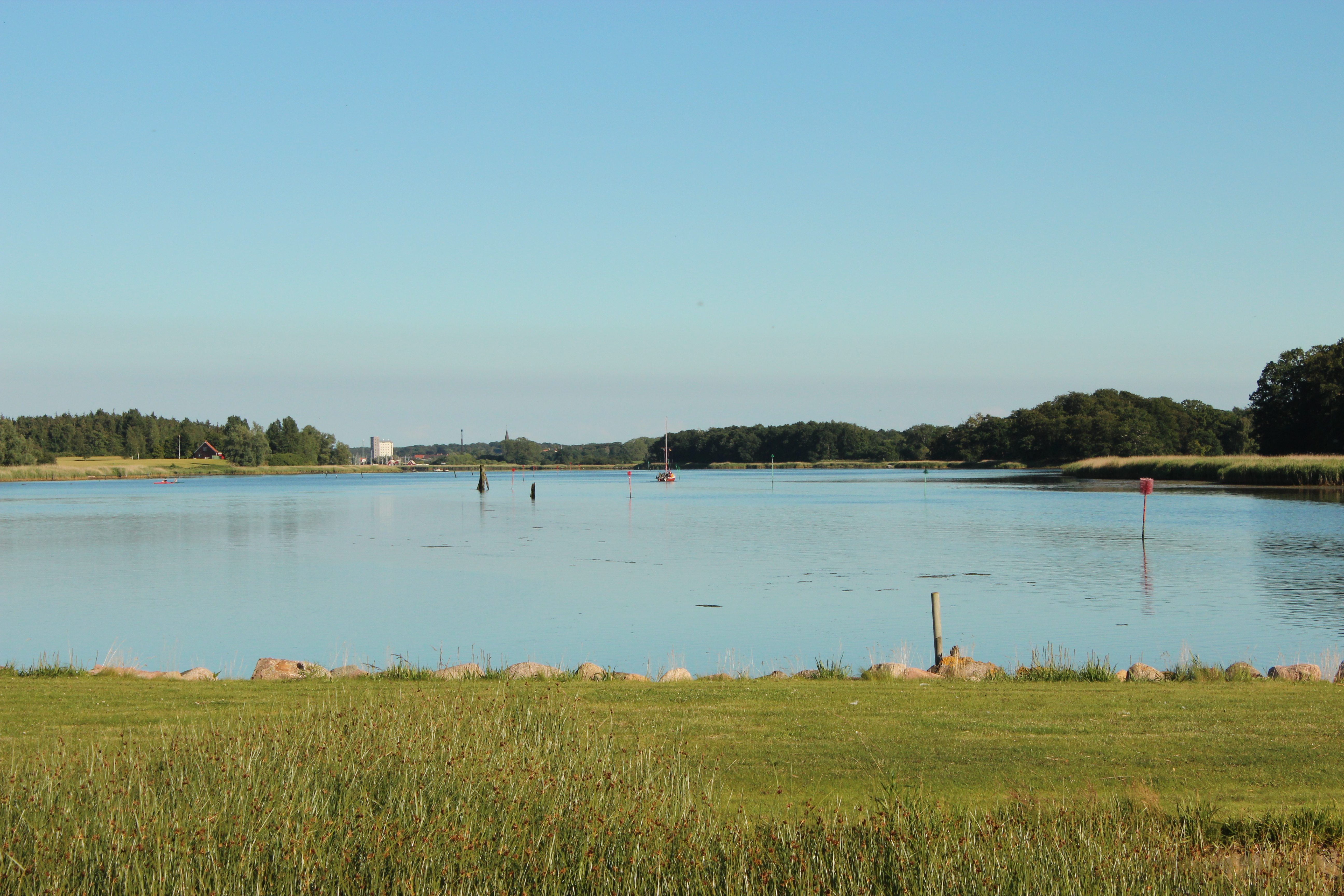 Sakskøbing Fjord set fra Oreby Kro ind mod Sakskøbing